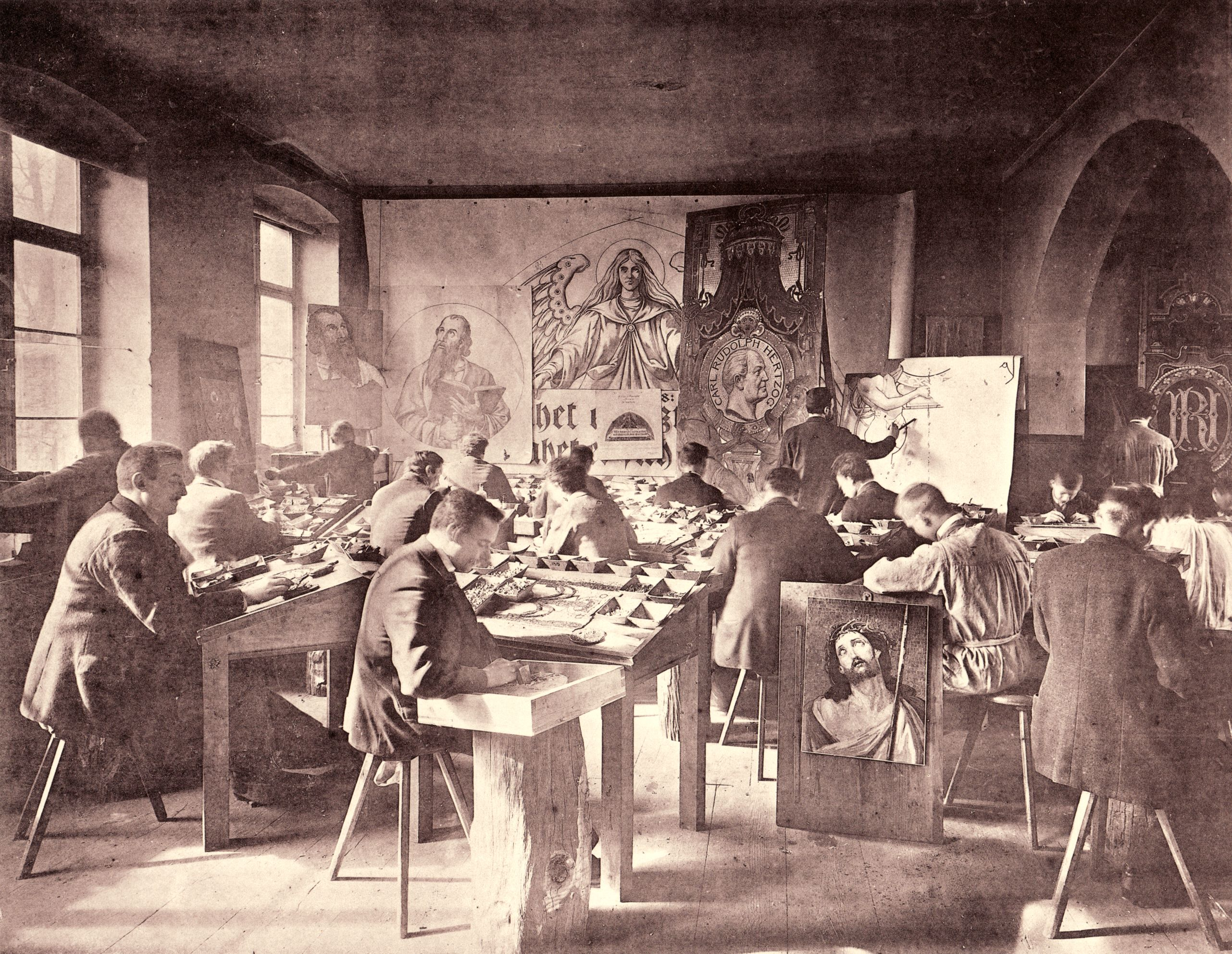 Deutsche Glasmosaik-Gesellschaft Puhl & Wagner − Rixdorf, Berlin: Setzersaal